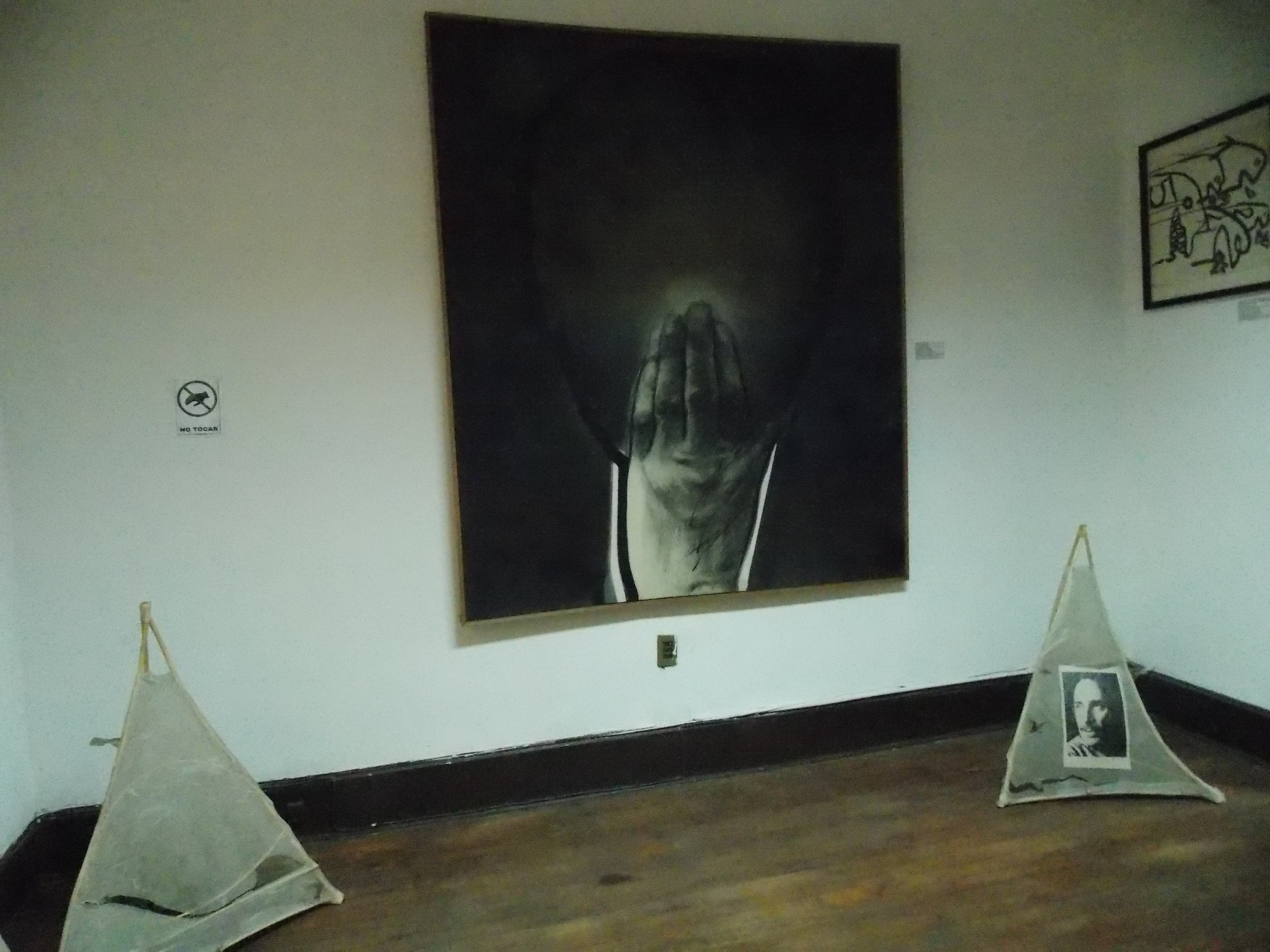 Parte de la exposición al interior del edificio